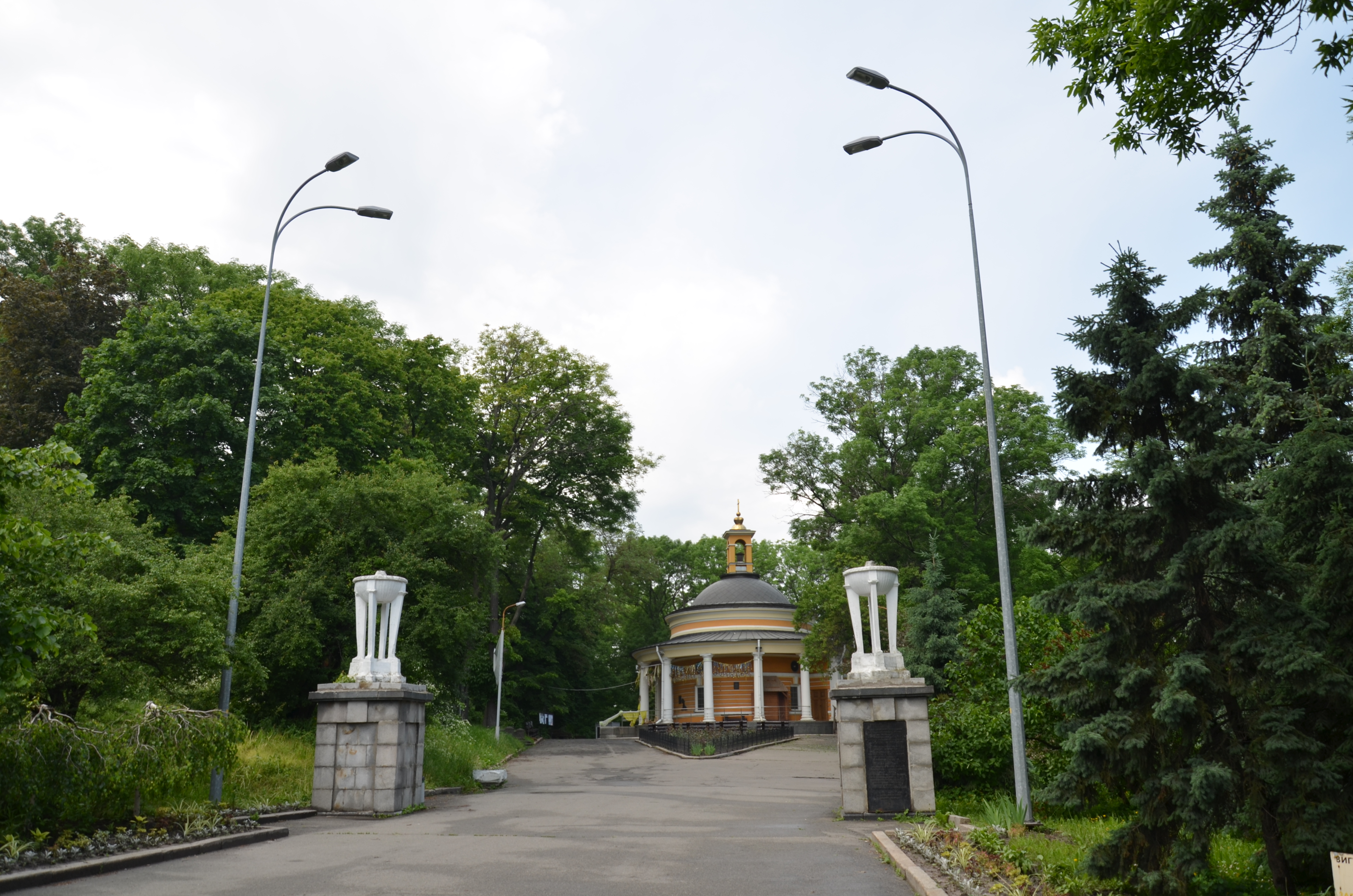 Історична місцевість-парк Аскольдова могила, де у 882 року на місці загибелі було поховано князя Аскольда; у 1786–1934 роках містився загальноміський некрополь, який включав поховання багатьох відомих осіб, Київ, Паркова дорога